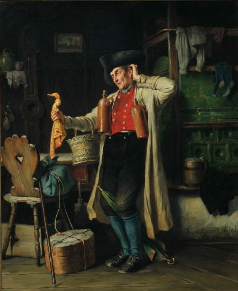 "Doch vergessen…" (laut rückseitiger Betitelung), Öl auf Leinwand, 56,5 x 47 cm, signiert, datiert (18)81, Ortsbez. "Münch"